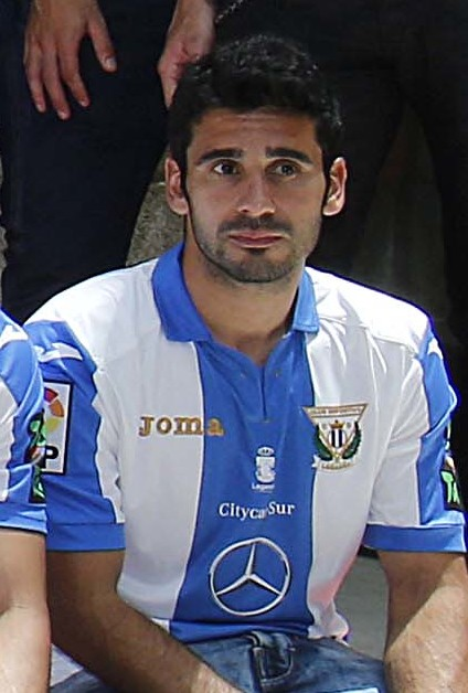 Felicidades pepineros!! Vuestro ascenso a Primera es la historia de un sueño, el resultado de vuestro trabajo y esfuerzo. Sois un orgullo para todo Madrid! Enhorabuena CD Leganés. #LeganésEsDePrimera